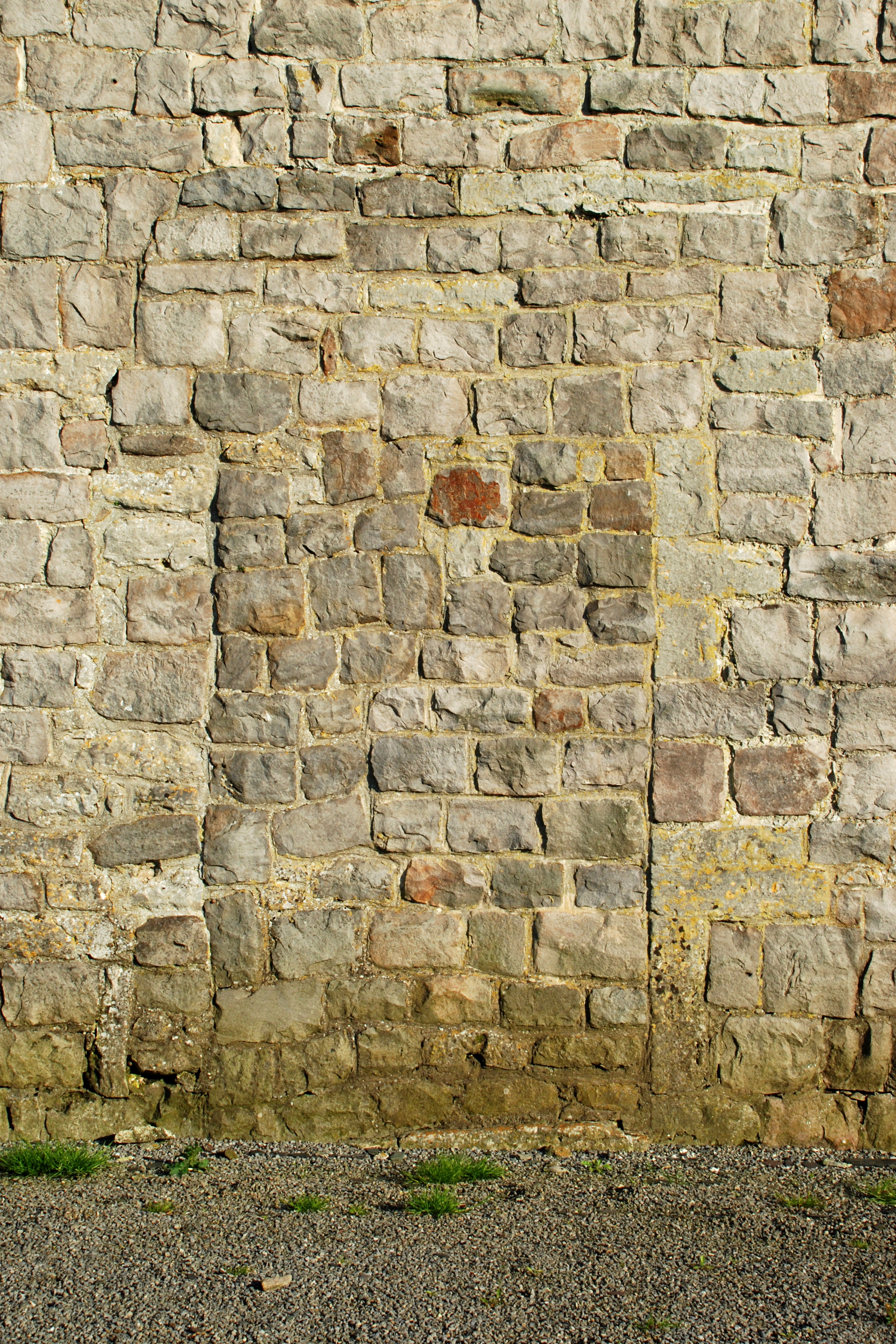 Belgique - Brabant wallon - Jodoigne - Piétrain - Chapelle Sainte-Catherine d'Herbais